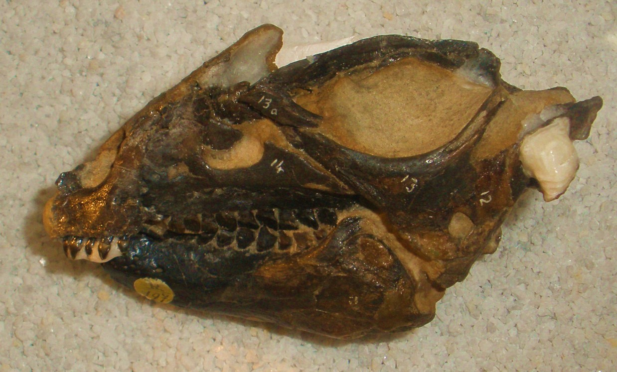 Fossil of Hypsilophodon (holotype NHM R197), an extinct ornithopod- Took the photo at Fossil Show, Munich